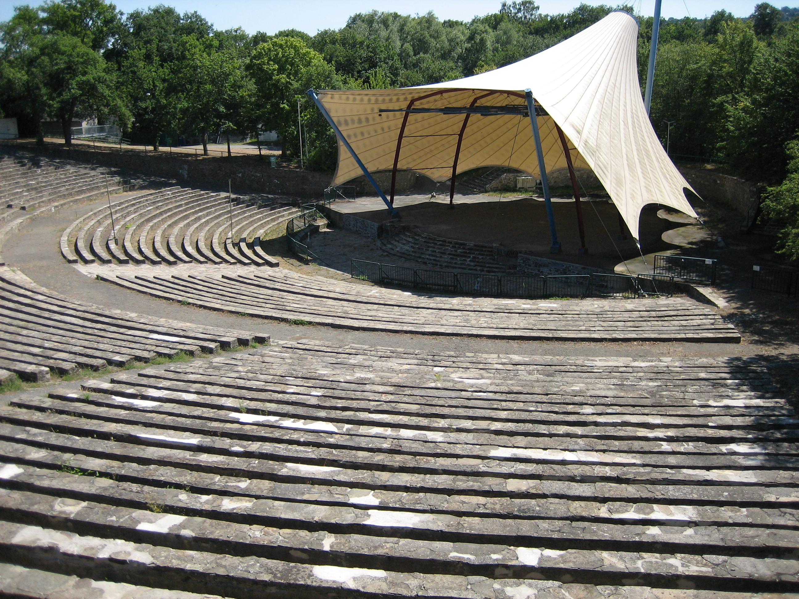 Amphitheater auf der Loreley